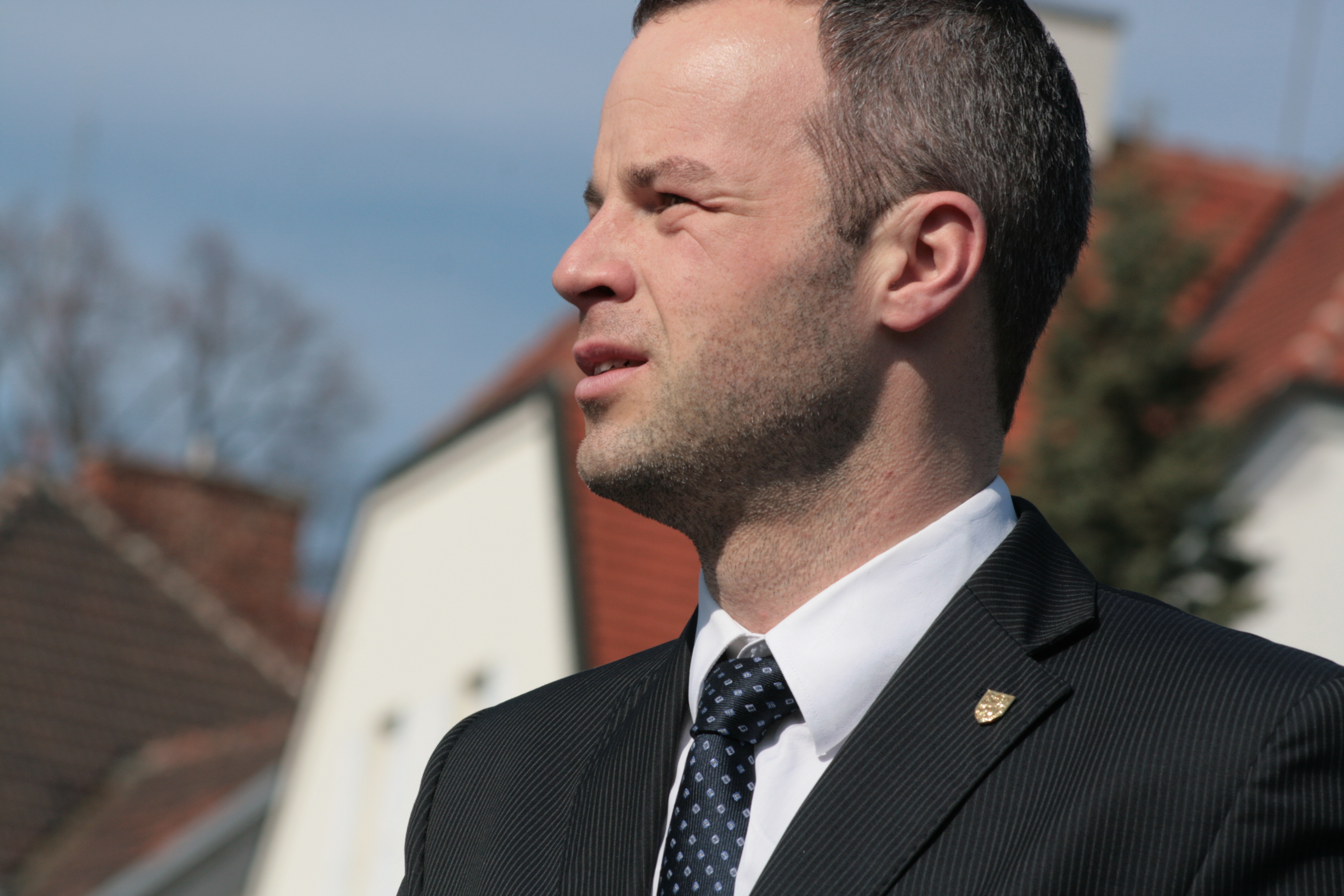 Radim Ochvat, ředitel tiskového odboru kanceláře prezidenta republiky. Dosluhující český prezident Václav Klaus a slovenský prezident Ivan Gašparovič se ve středu 6. března 2013 setkali ve vile Tugendhat v Brně, aby si vzájemně předali státní vyznamenání - Řád bílého lva 1. třídy a Řád bílého dvojkříže 1. třídy. ČTK: Prezidenti ČR a Slovenska si předali nejvyšší státní vyznamenání CTK: Czech and Slovak presidents present each other with state decorations